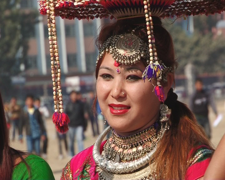 नेपाली: थारु महिला